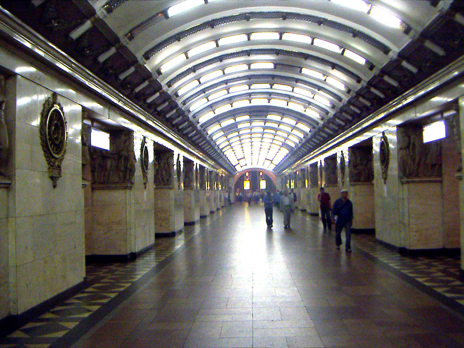 Narvskaya_metrostation in S-Petersburg